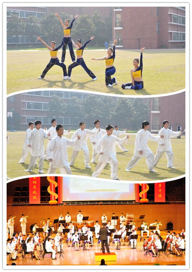 进才实验艺术